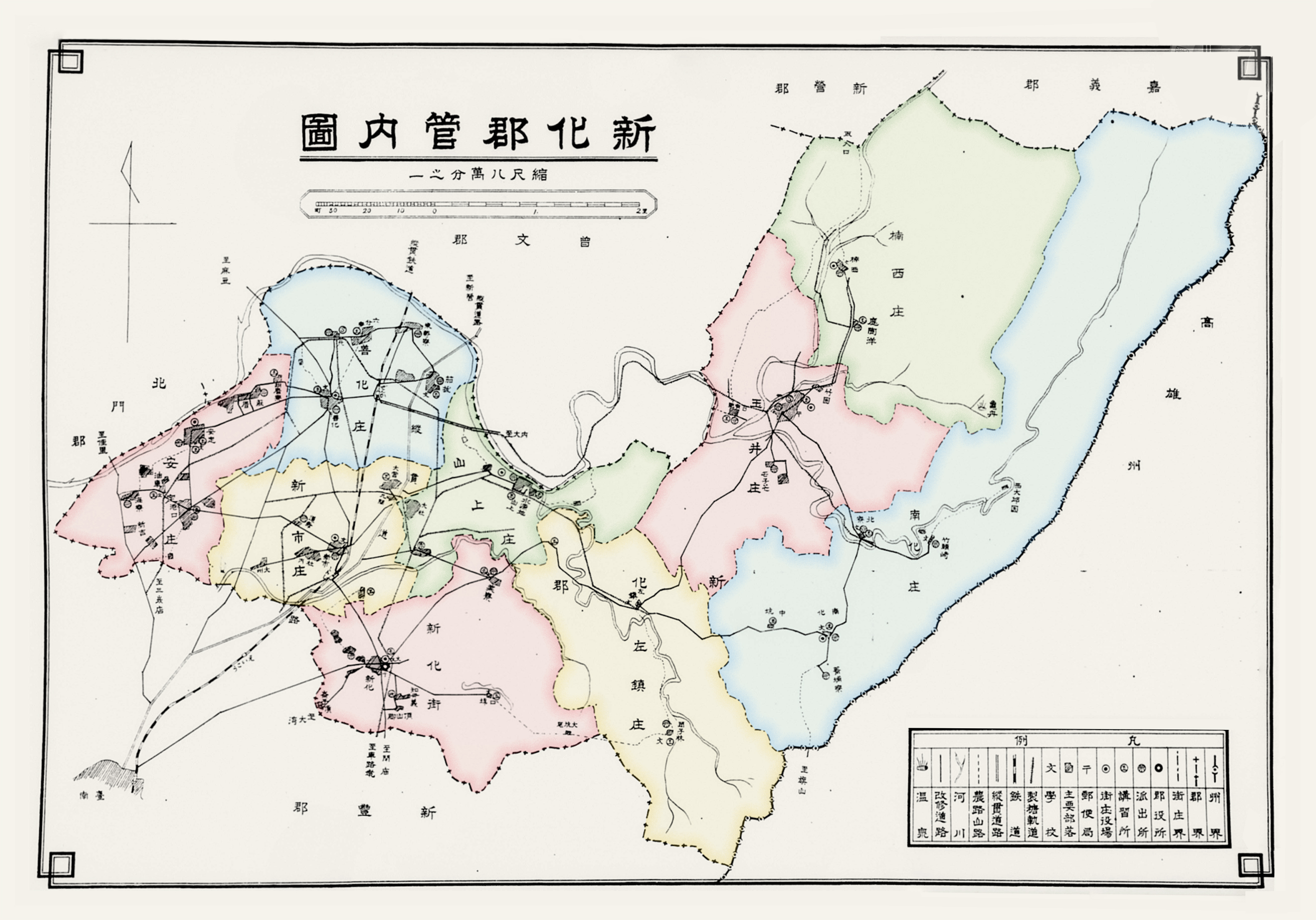 中文（台灣）: 新化郡轄下有新化街、善化街、新市庄、安定庄、山上庄、玉井庄、楠西庄、南化庄、左鎮庄